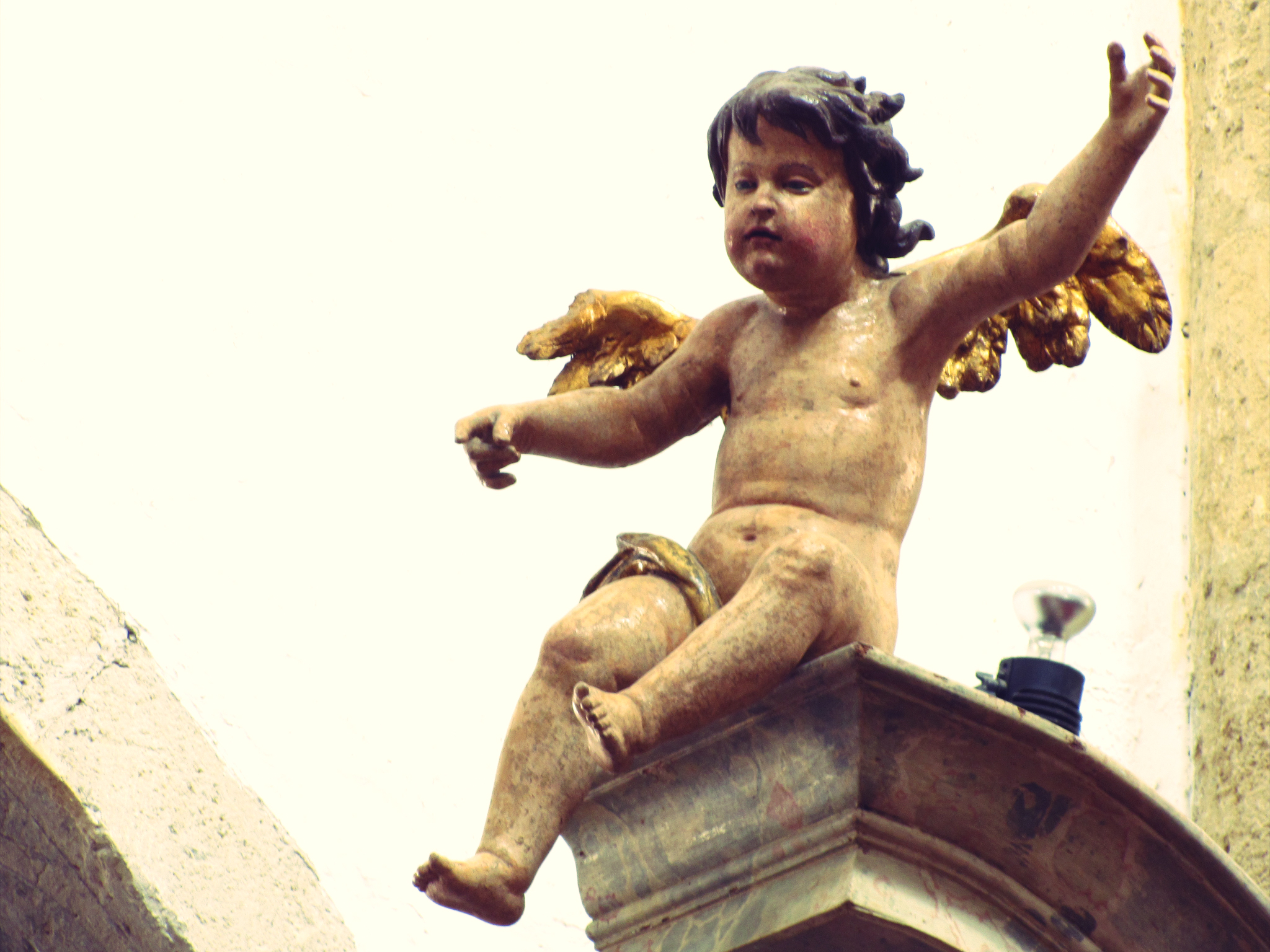 Ptuj Cherub